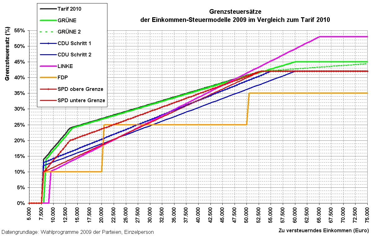 Vergleich der Steuermodelle zur Bundestagswahl 2009 hinsichtlich Grenzsteuersatz.